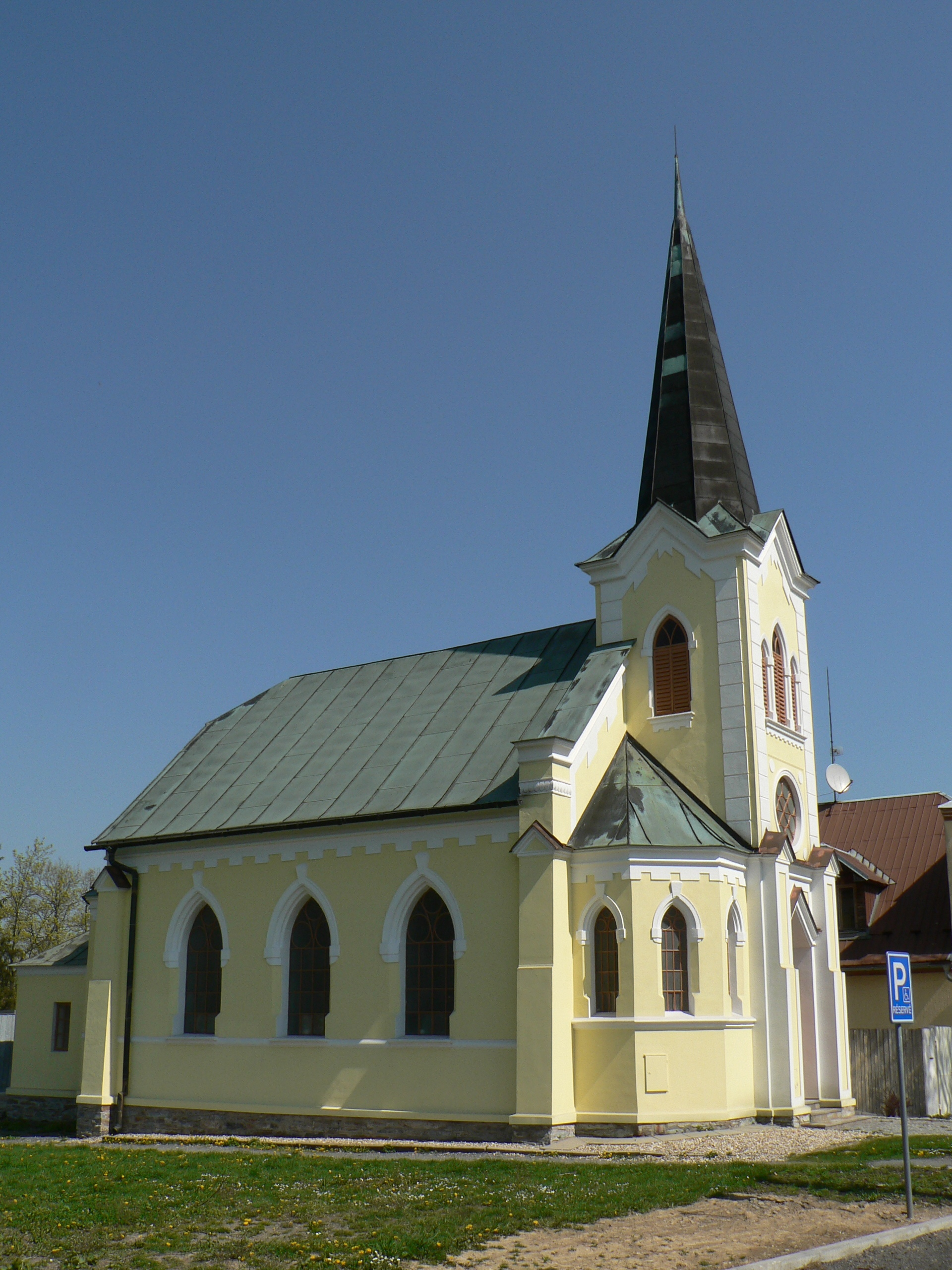 Starokatolický kostel sv. Ducha v Břidličné.